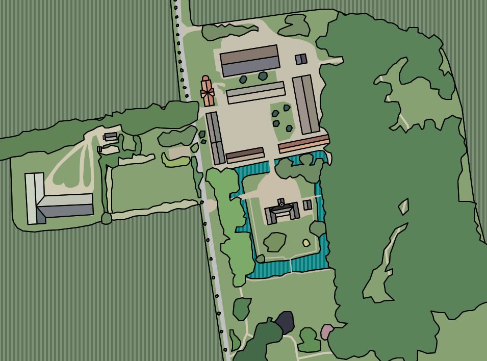 Oversigtsbillede af Selchausdal Gods, ved Tissø på Vestsjælland. Illustration lavet af Mathias Ystrøm ud fra luftfoto fra 2004.